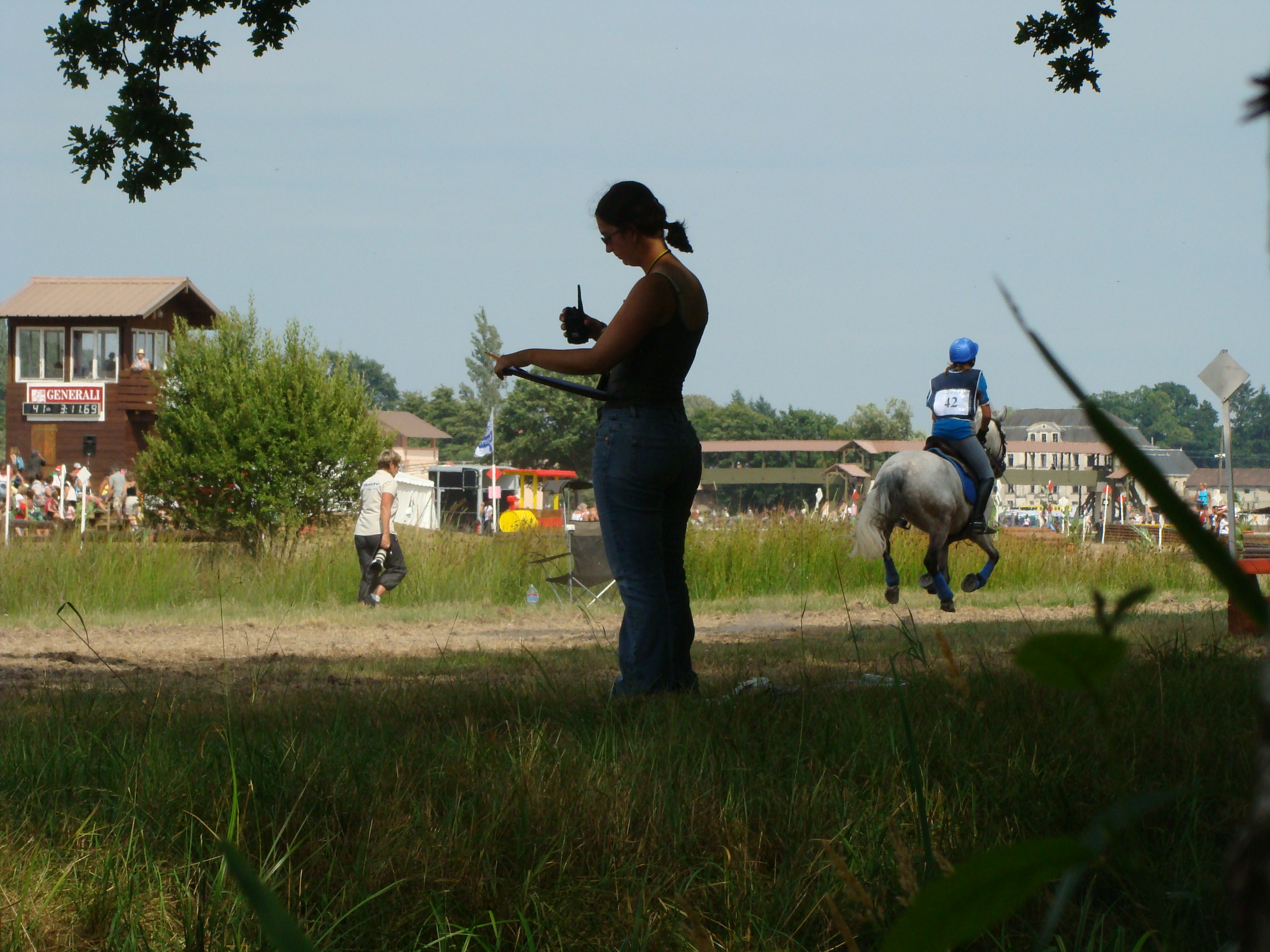 picture taken at 2008 generali opn de france 2008